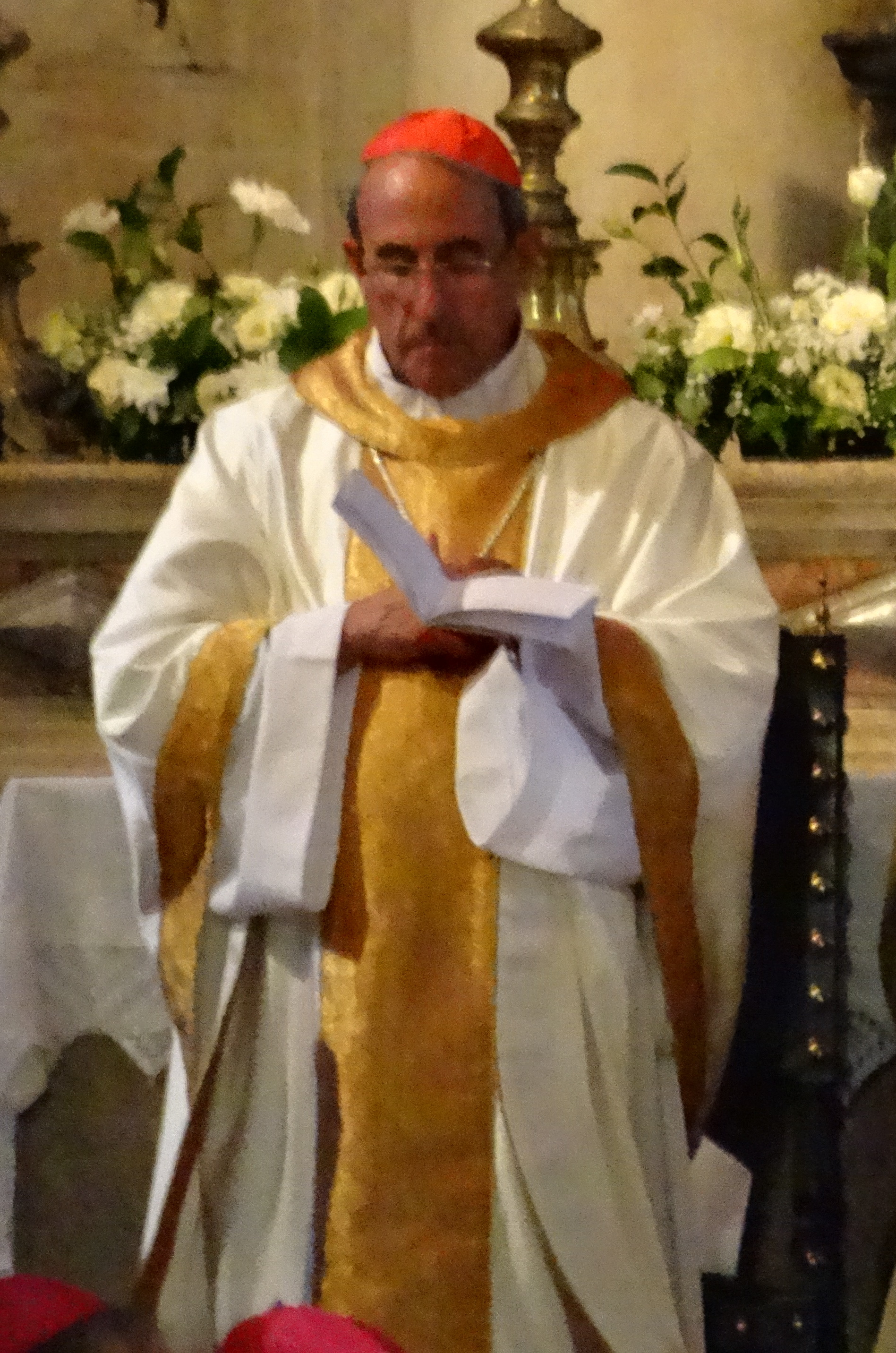 José Tolentino Mendonça